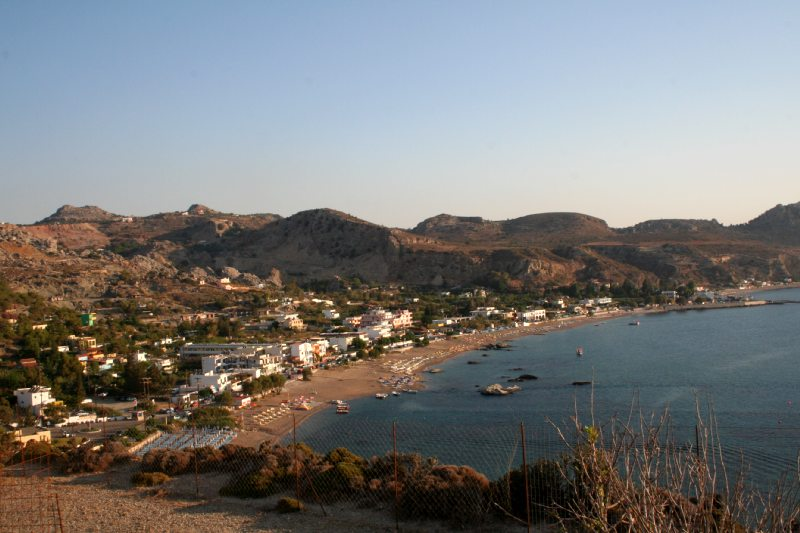 Stegna Bucht vom Berg Richtung Norden